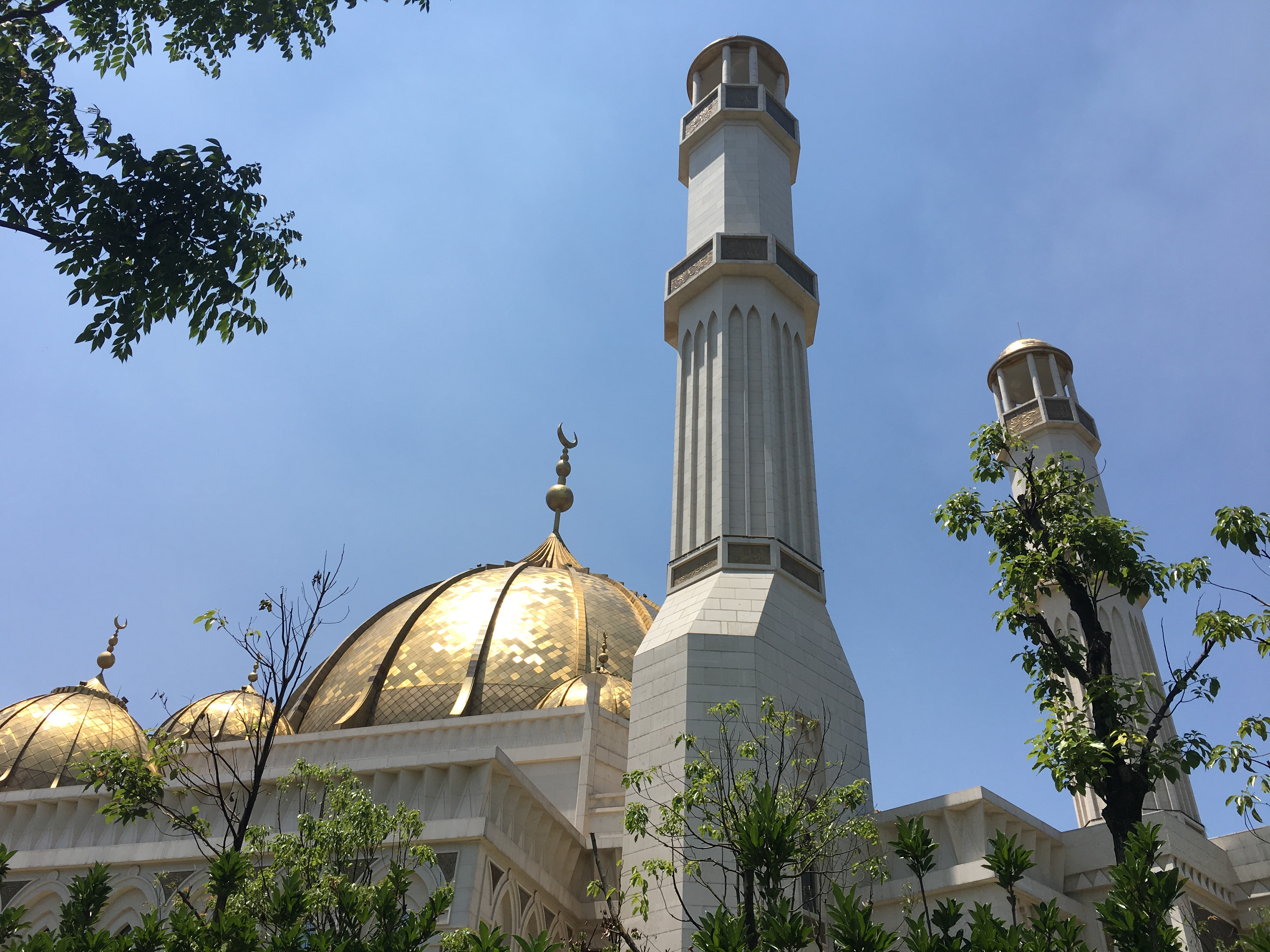 侧面拍摄的杭州清真寺穹顶和宣礼塔